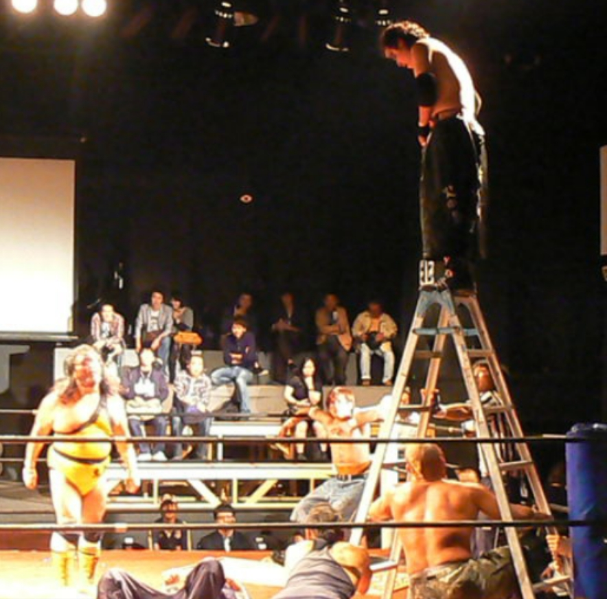 ラダースワントーン